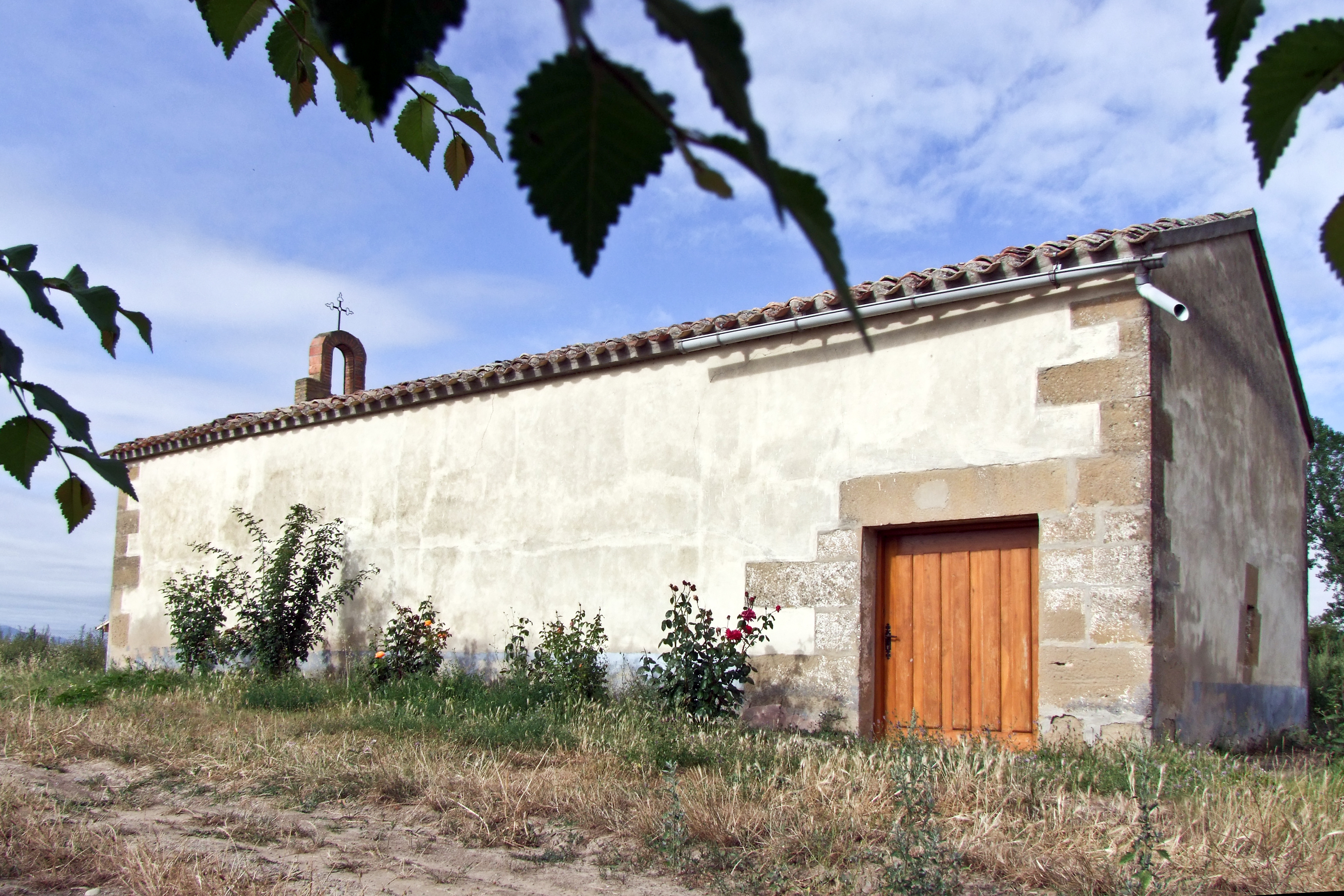 Ermita del Pilar en la localidad de Baños de Rioja, La Rioja - España